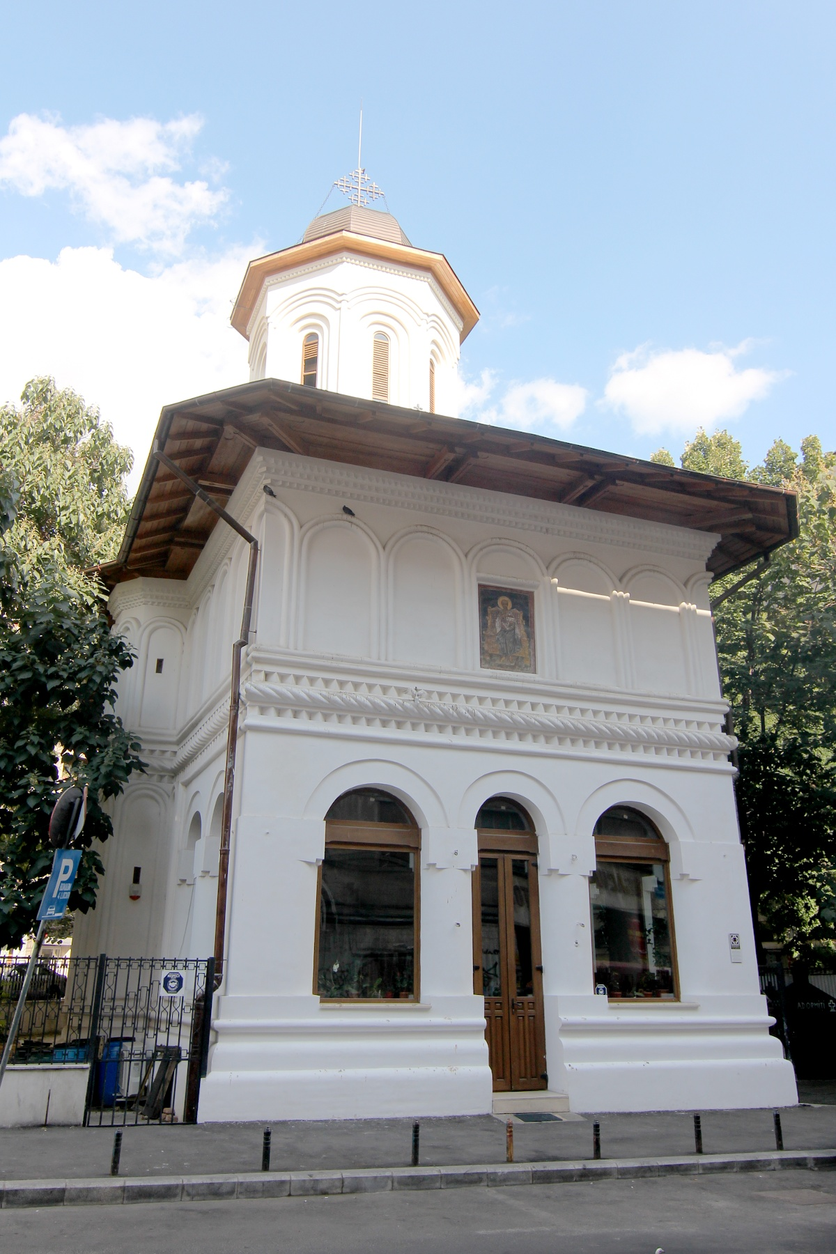 Biserica „Sf. Nicolae“ - Dintr-o zi